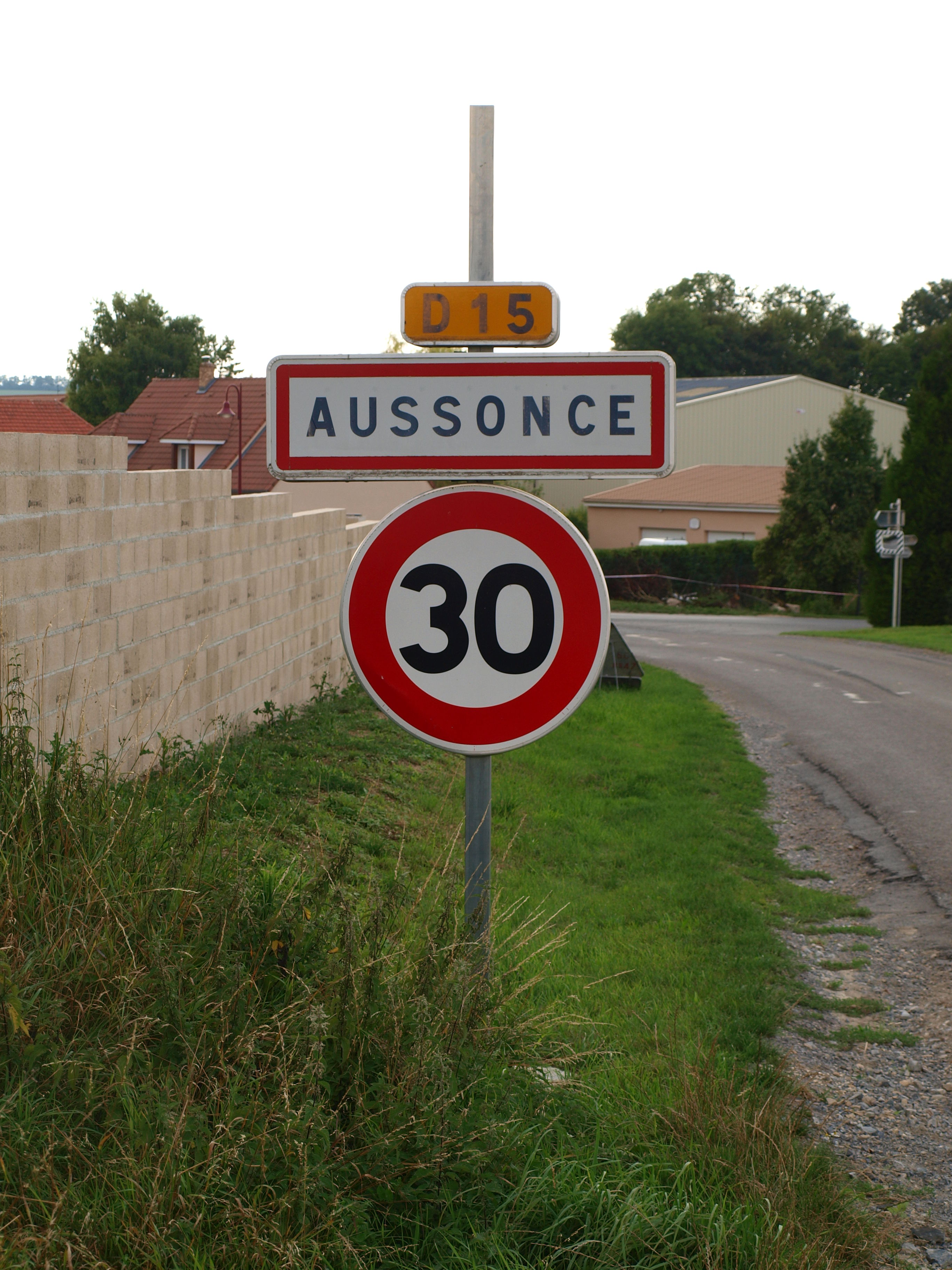 Aussonce (Ardennes, France) ; panneau d'agglomération.